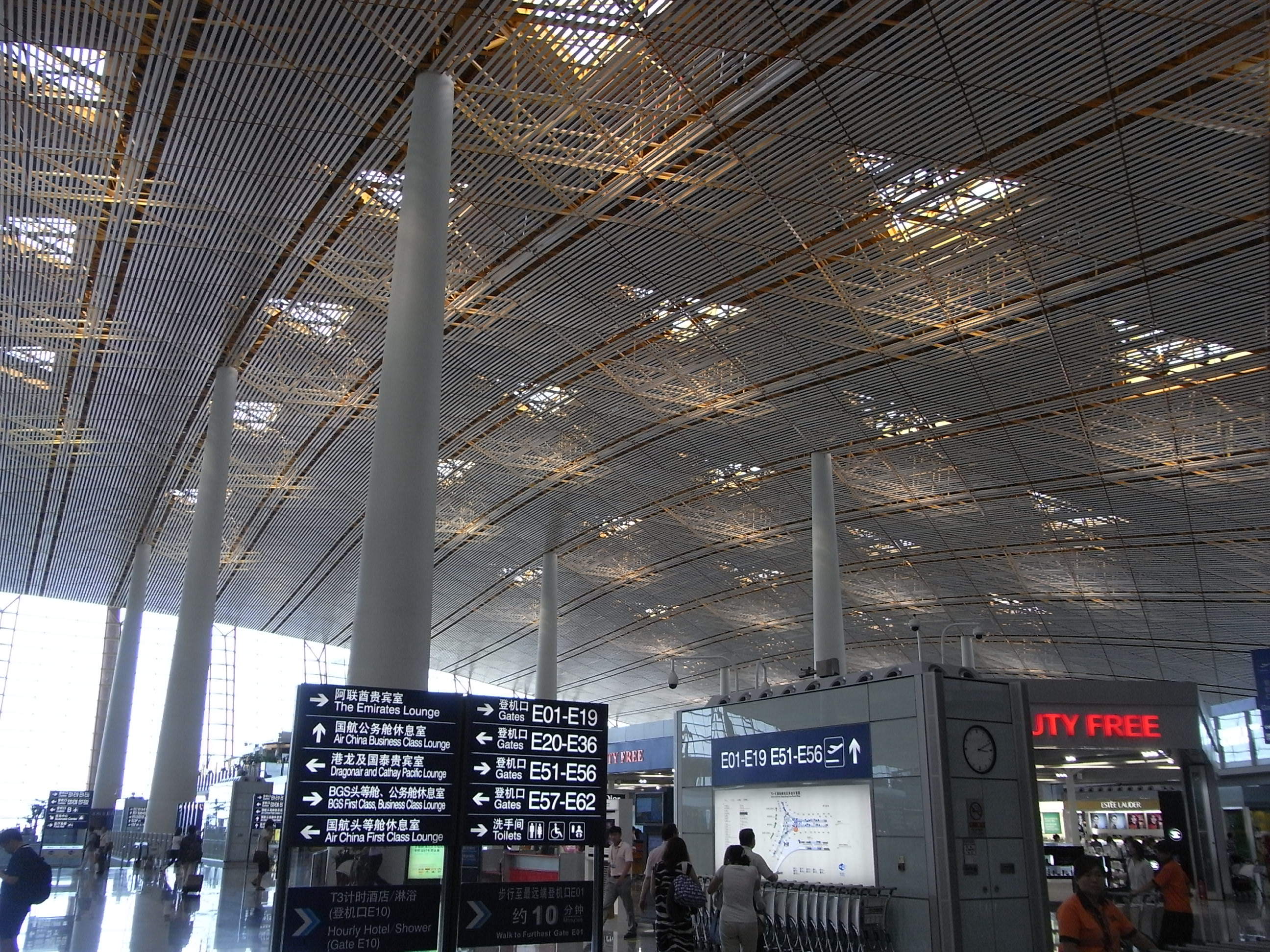 zh:2010年zh:8月北京 北京首都國際機場